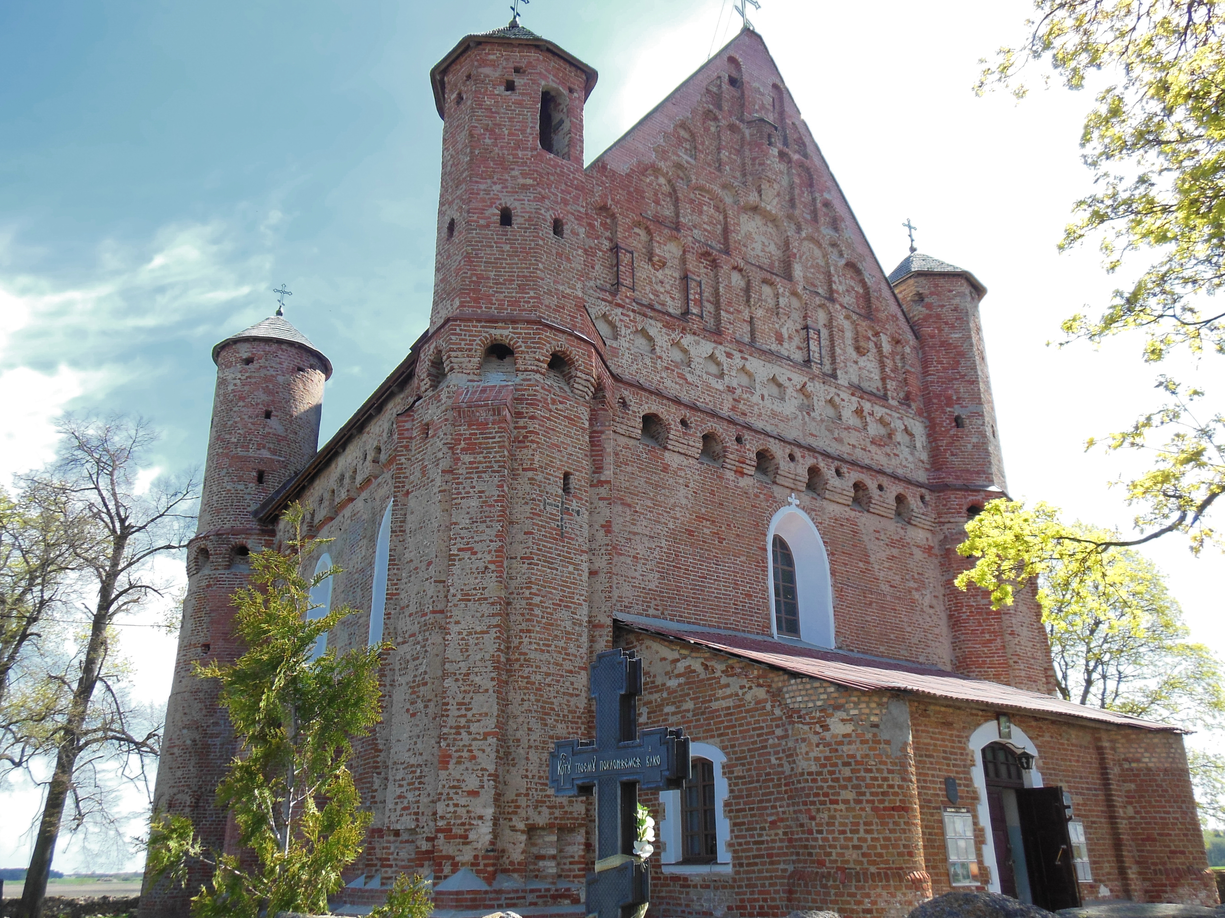 Беларуская (тарашкевіца): Царква абарончага тыпу. в. Сынкавічы This is a photo of Belarusian heritage monument. Reference number: 410Г000282 ( WLM)